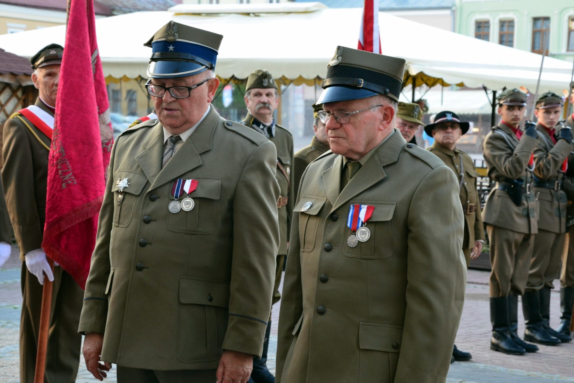 Janusz Niemiec des Sohns von Antoni Żubryd an der Gedenktafel für die Opfer des kommunistischen Terror in Sanok